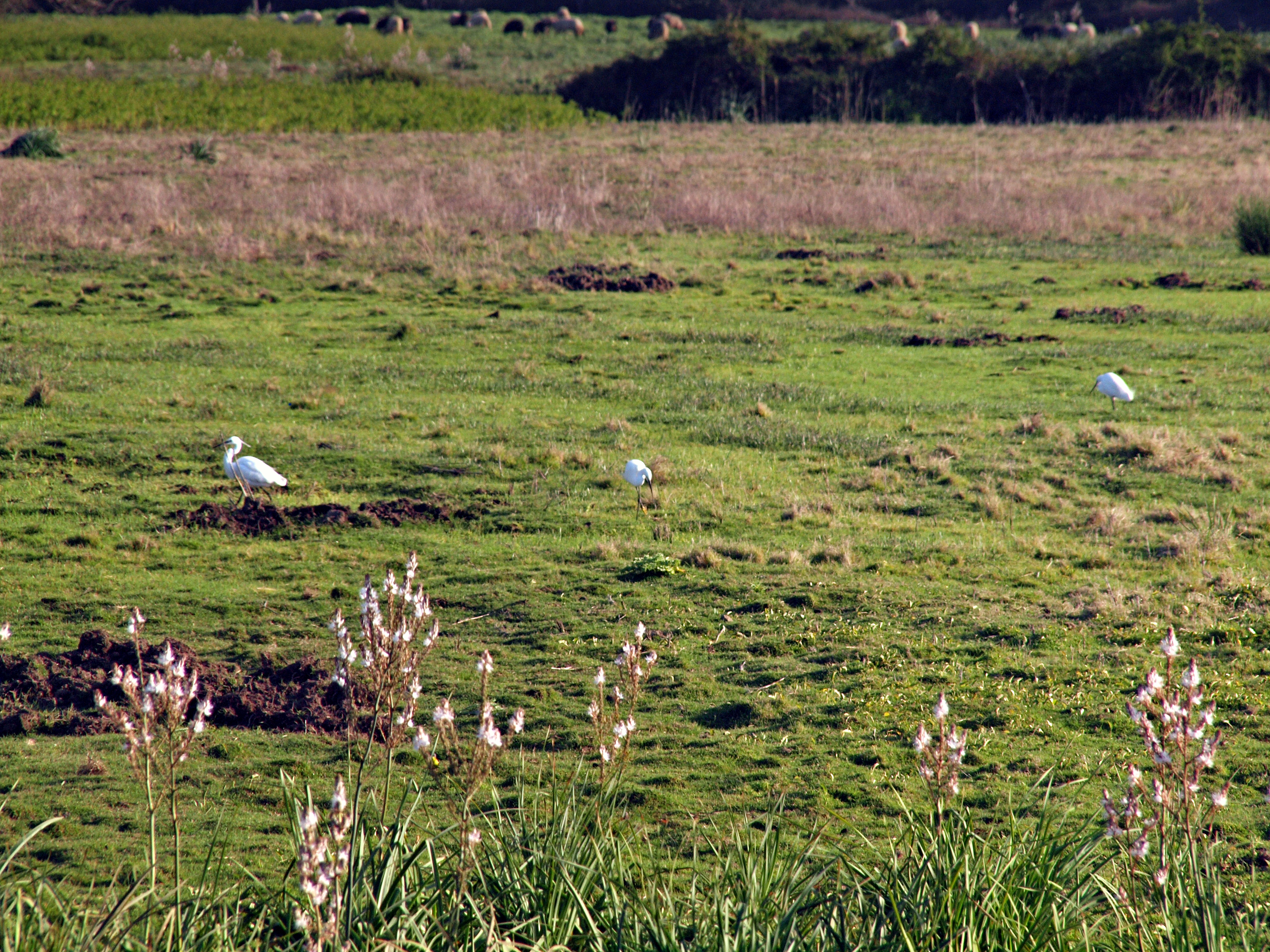 Belgodère (Corse) - Aigrettes dans le pré en bordure du Regino, face à la roselière.